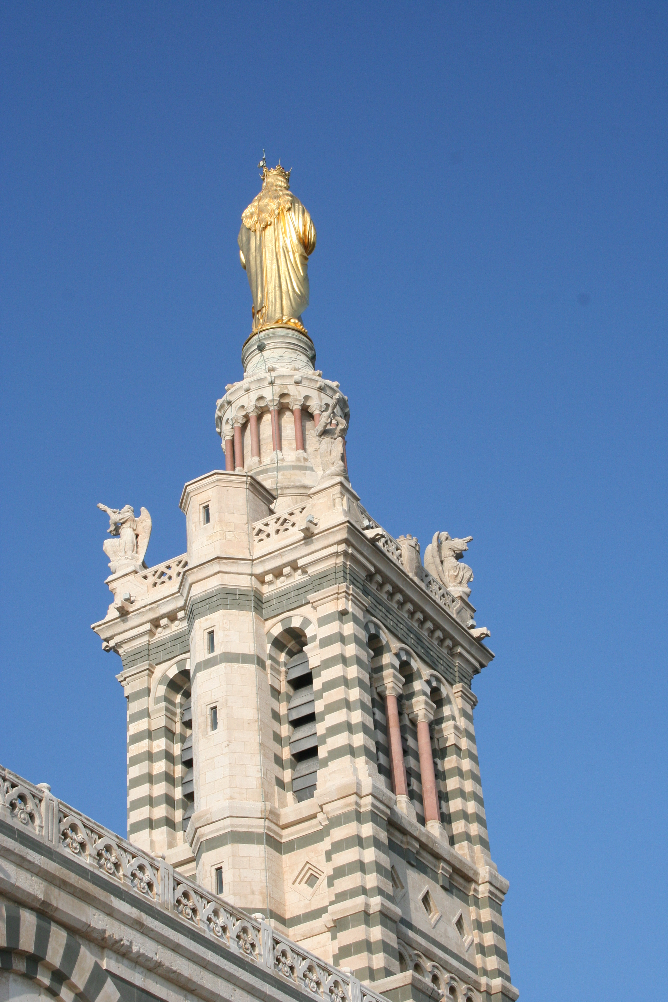 Cage d'escalier contre le campanile de la basilique Notre-Dame de la Garde à Marseille